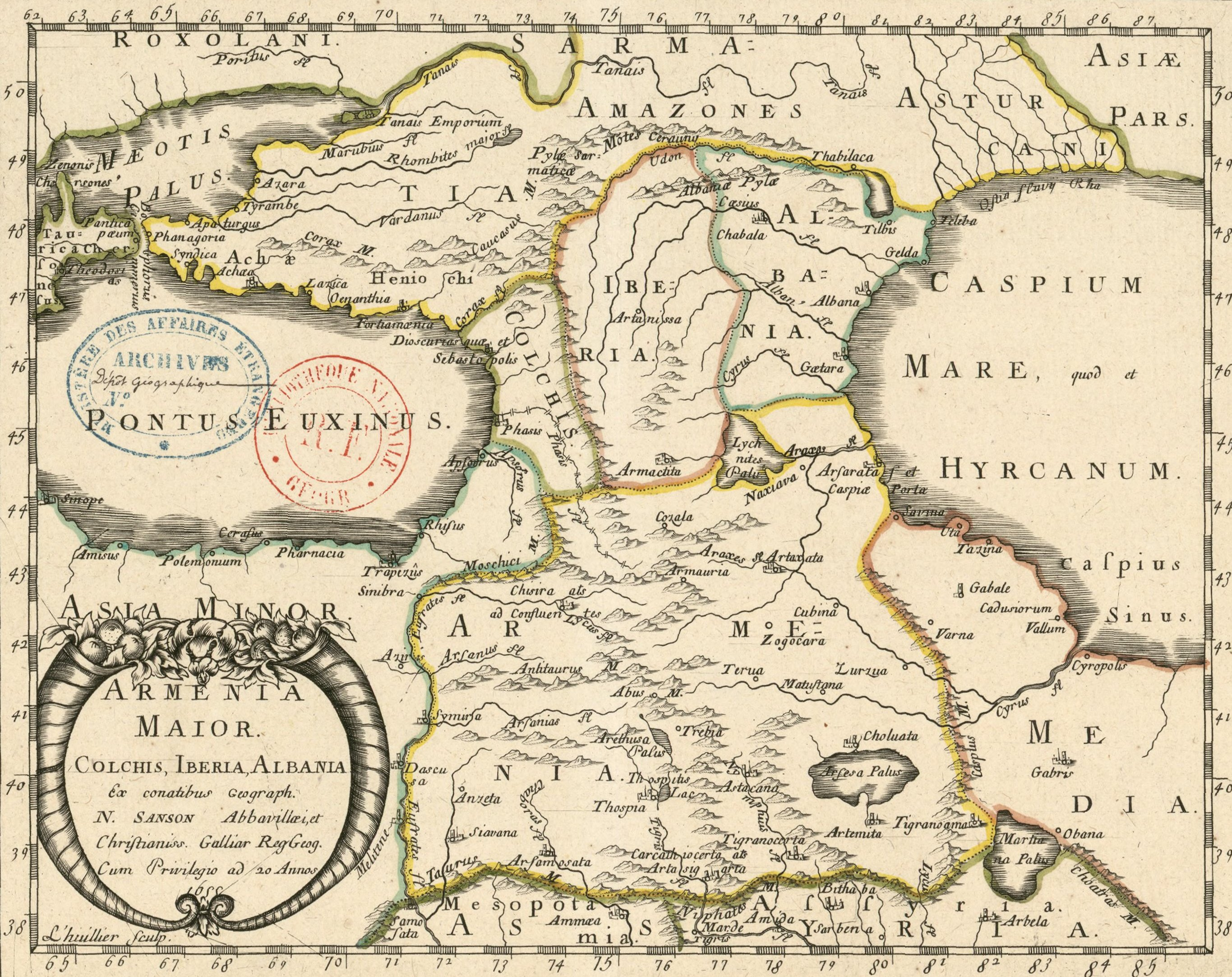 Armenia maior, Colchis, Iberia, Albania / ex conatibus geograph. N. Sanson ; L'huillier sculp. Dimensions: 25.5 × 35.5 cm (10 × 14 in)